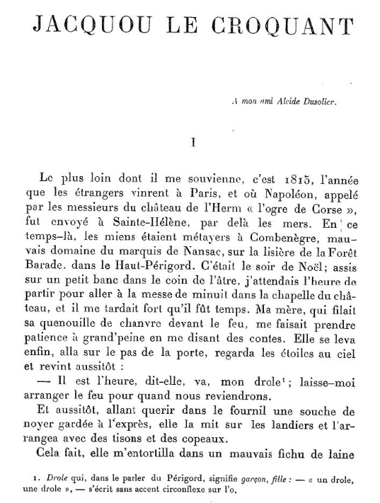 Première page de Jacquou le Croquant publié en 1899 dans la Revue de paris.